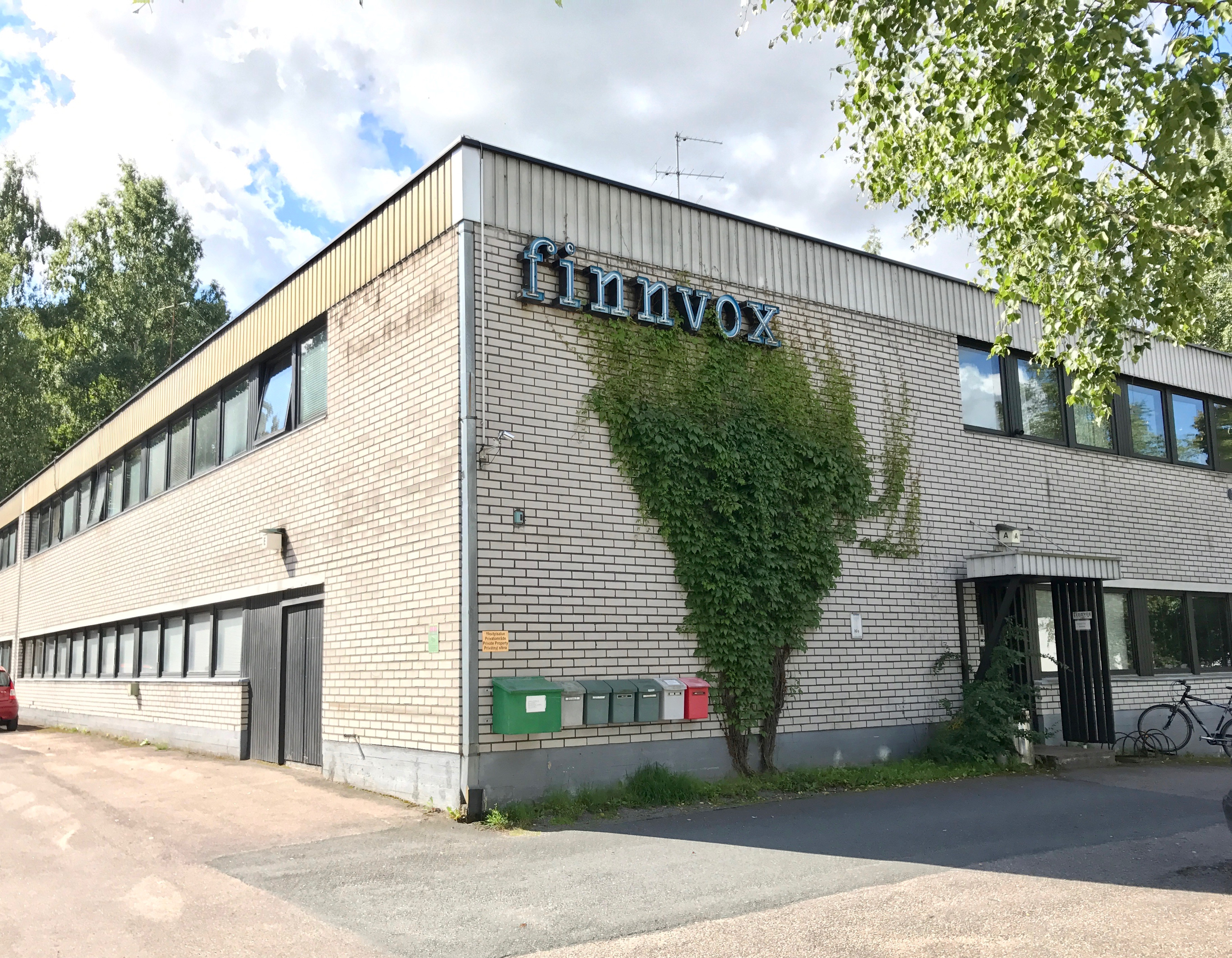 Finnvoxin studiot Pitäjänmäellä